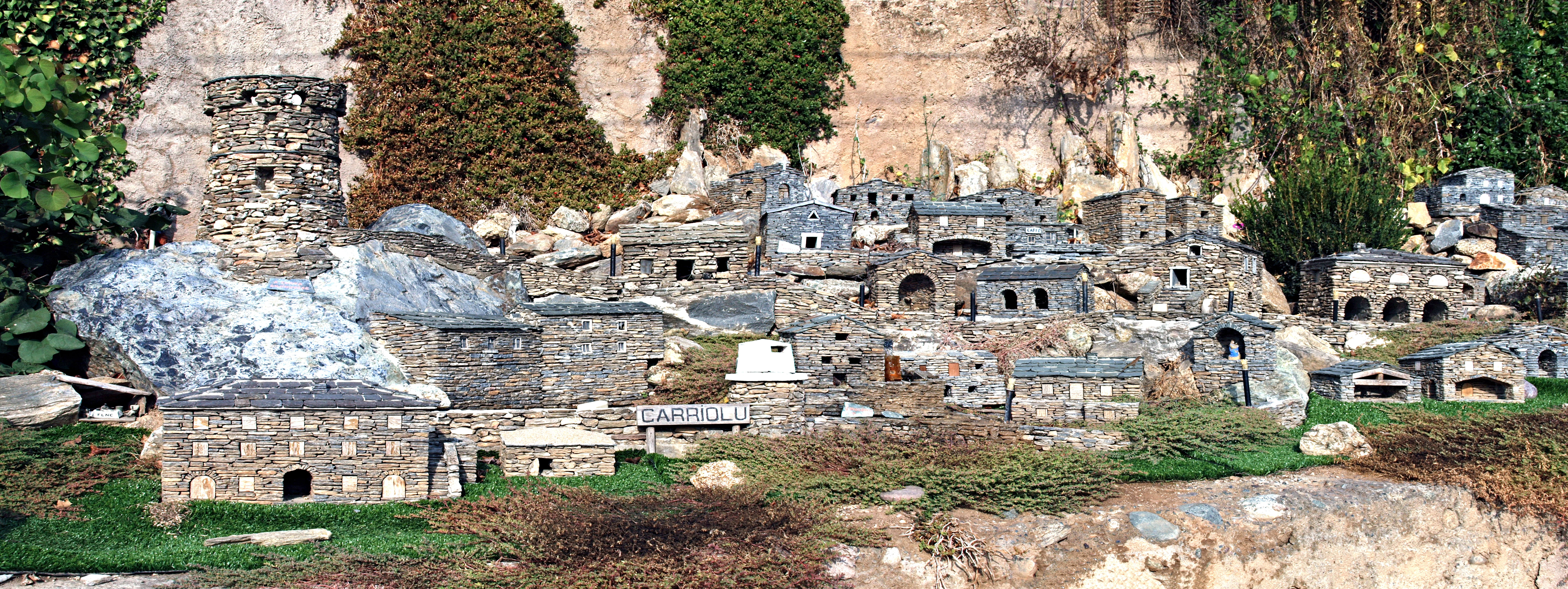 Castello-di-Rostino, Rustinu (Corse) - Reproduction en miniature de Carriolu (village moyenâgeux détruit), œuvre de l'imaginaire d'un particulier à Ponte-Novu